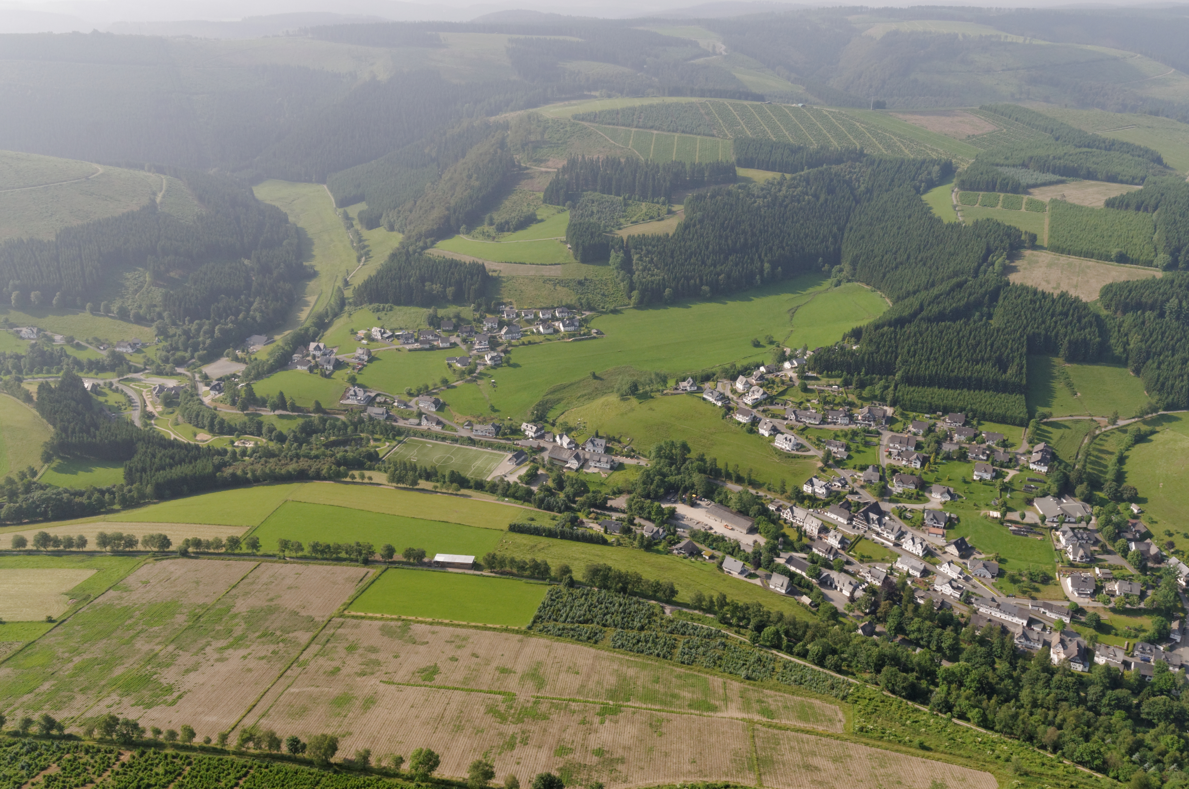 Fotoflug Sauerland-Ost, Östliches Schmallenberg-Westfeld, Blick Richtung Süden auf die Berge Ennest (rechts) und Hömberg (links), das Lennetal dazwischen The making of this document was supported by the Community-Budget of Wikimedia Germany.